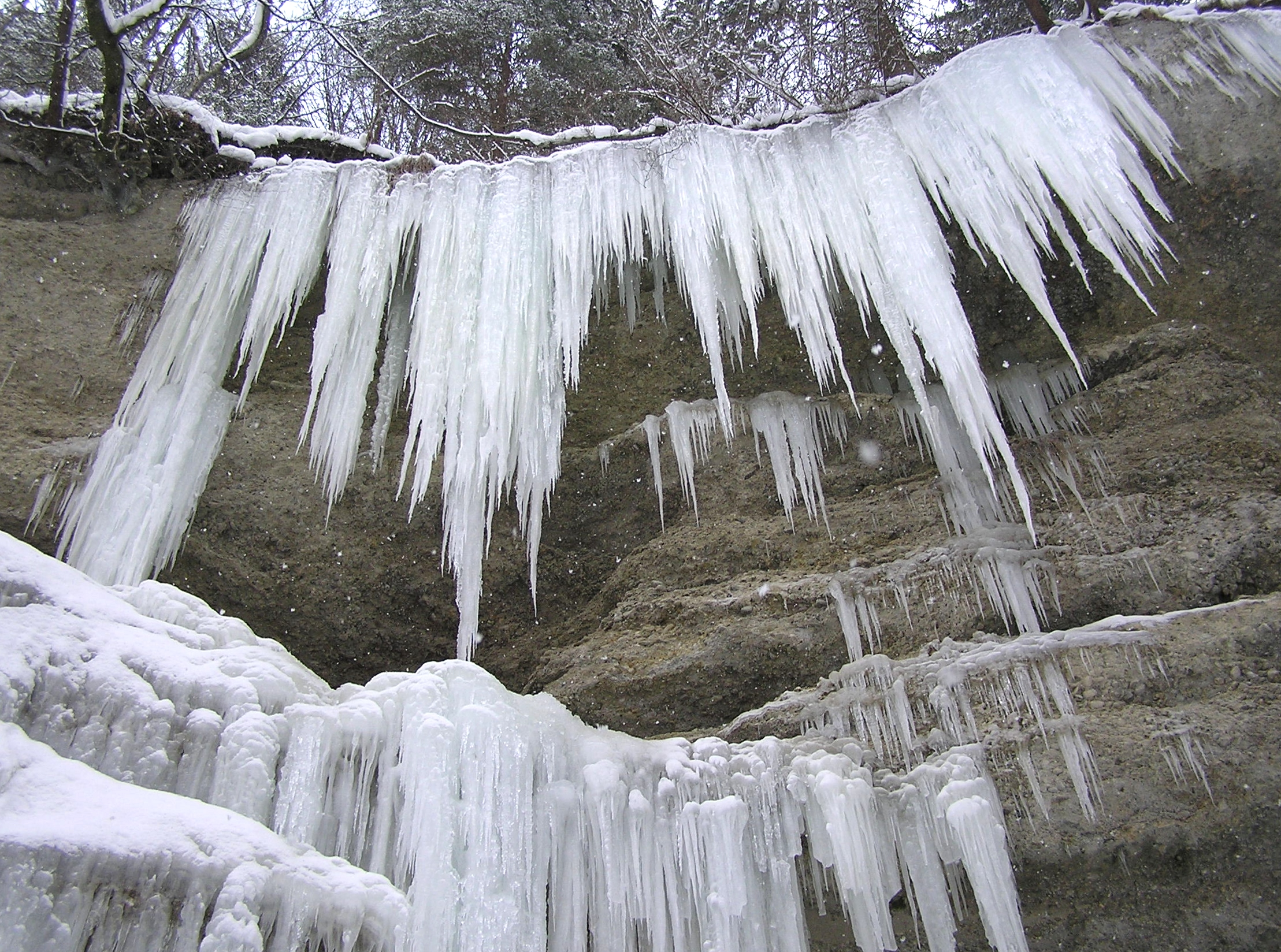 Wasserfall am östlichen Ende des Geotops "Pähler Schlucht" im Winter.